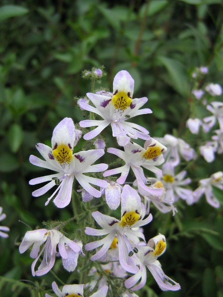 Schizanthus pinnatus Ruiz et Pavon, Pirque (Puente Alto Prov.Cordillera)